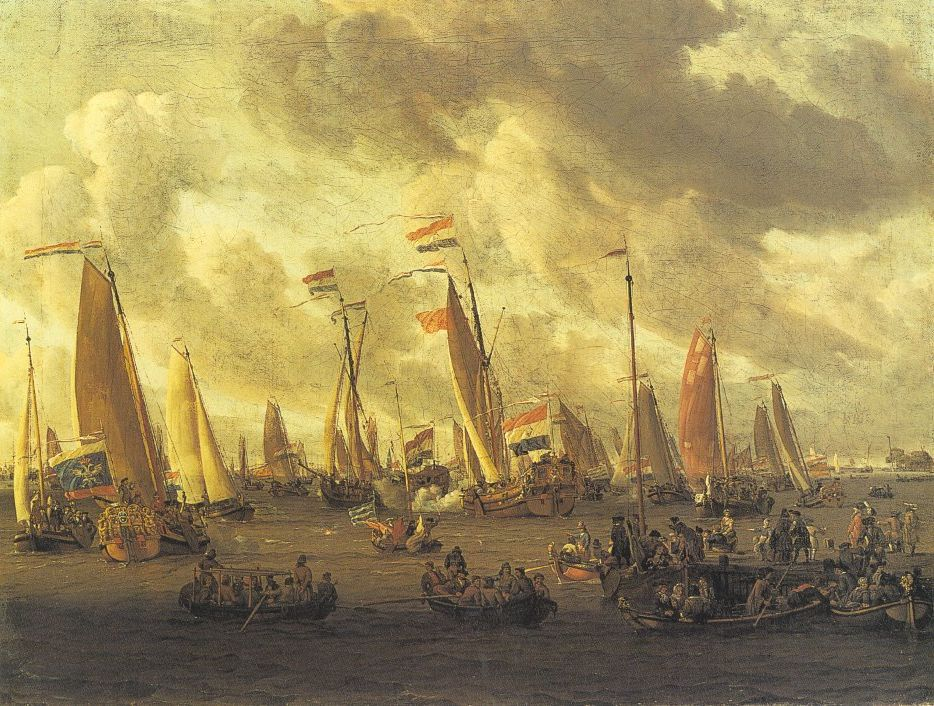 Абрахам Сторк (Шторкк). Показательный бой на реке Эй в честь Петра I 1 сентября 1697 года. 1697—1700. Холст, масло. Оригинал находится в коллекции Amsterdam Museum